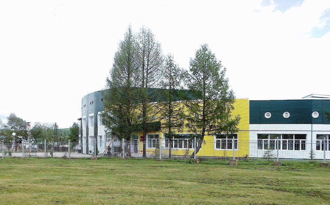 Новая школа в Баянголе